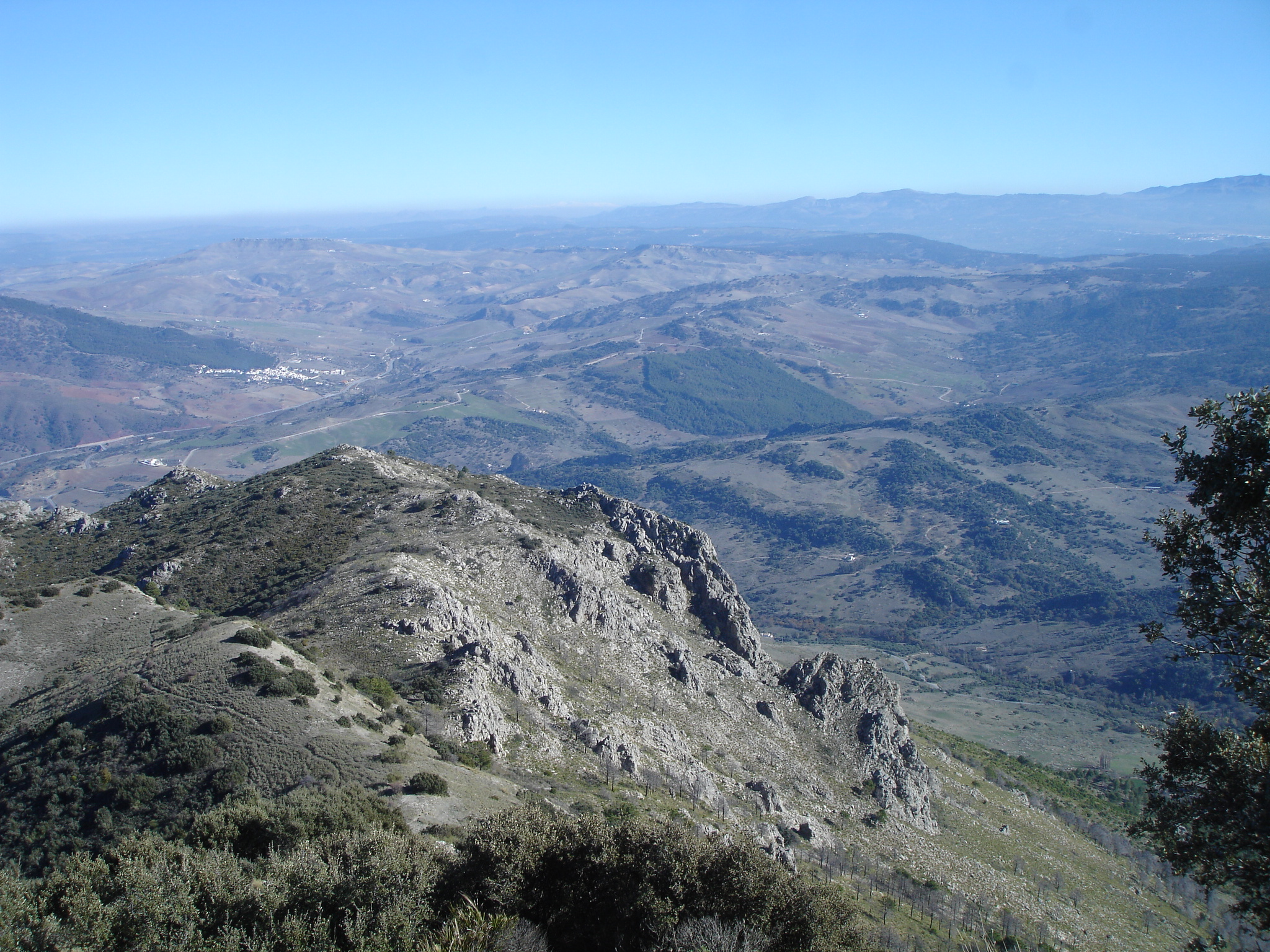 View from Cerro Coros, Puerto de las Palomas (Grazalema - Spain)